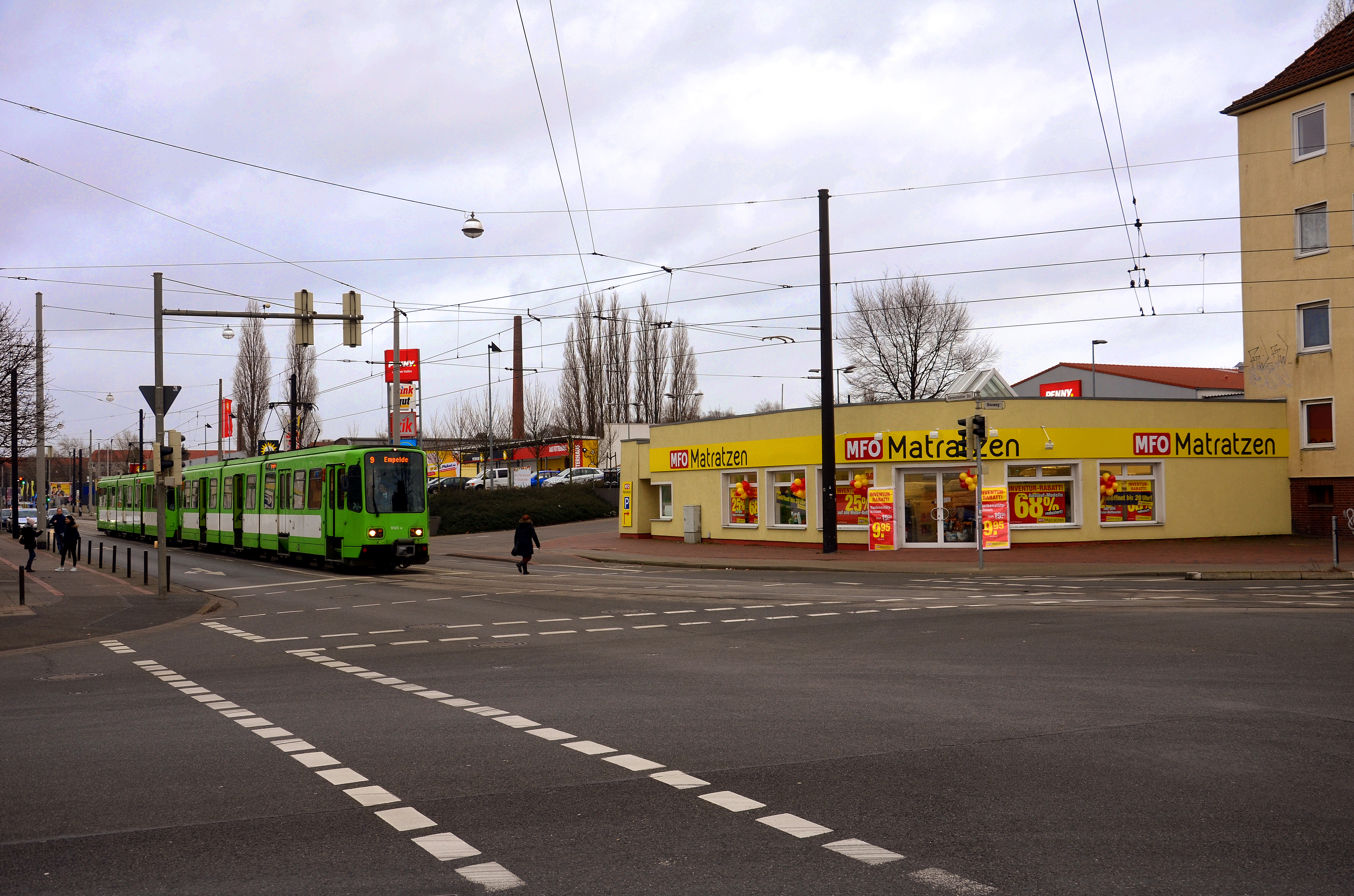 Von dem 1892 zunächst in Leipzig gegründeten Unternehmen Tänzers Original Grudeofenfabrik, die zwischen 1907 und 1908 nach Hannover und Linden verlegt wurde und dort zeitweilig unter der Adresse Bauweg 38 ihren Sitz hatte, zeigt dieses Foto lediglich noch das gelb gestrichene Lagergebäude mit der Pförtnerloge. Das im Dezember 2016 aufgenommene Foto zeigt das gelbe Bauwerk mit Werbung für MFO Matratzen unter der Adresse Davenstedter Straße 109G. Dahinter ist anstelle des ehemaligen Hauptgebäudes von Tänzers Original Grudeofenfabrik die rotweiße Werbung für einen Penny-Markt zu erkennen ...